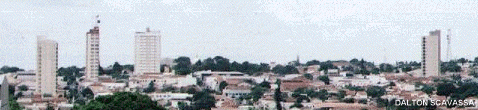 Pequena imagem da visão da área central de Tupã, SP, Brasil, a partir do bairro Parque Universitário. Fotografia obtida por Dalton Scavassa (pt:2002) através de câmera analógica e digitalizada com scanner de mão Genius Scan/Mate Color.